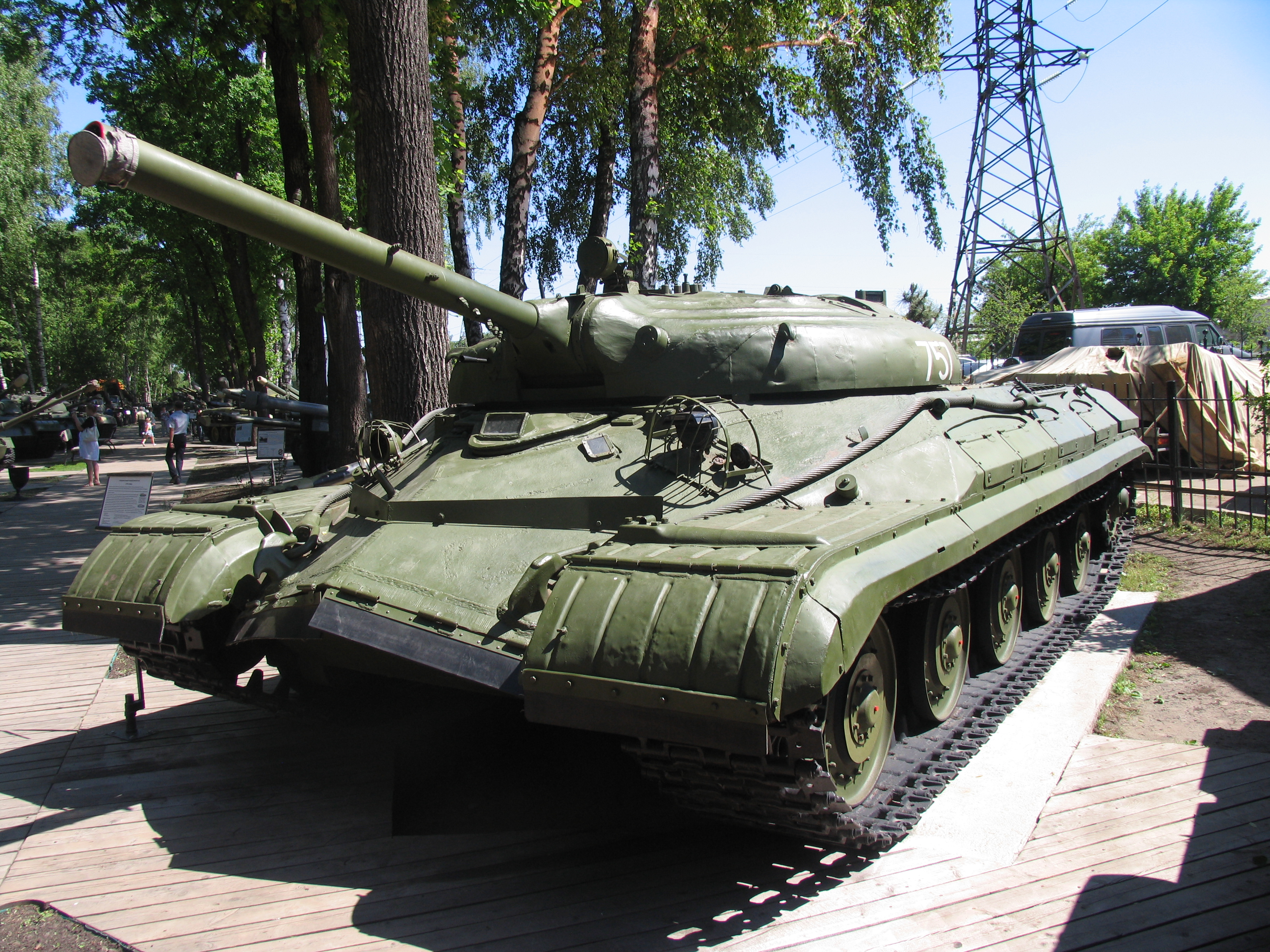 Объект 757 в Музее техники Задорожного.